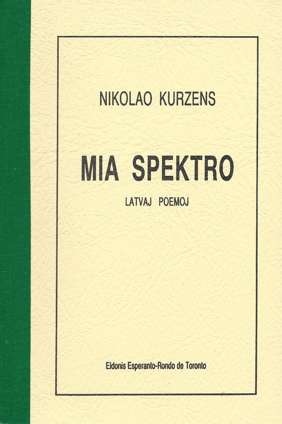 librokovrilo de libro "Mia Spektro", 1985